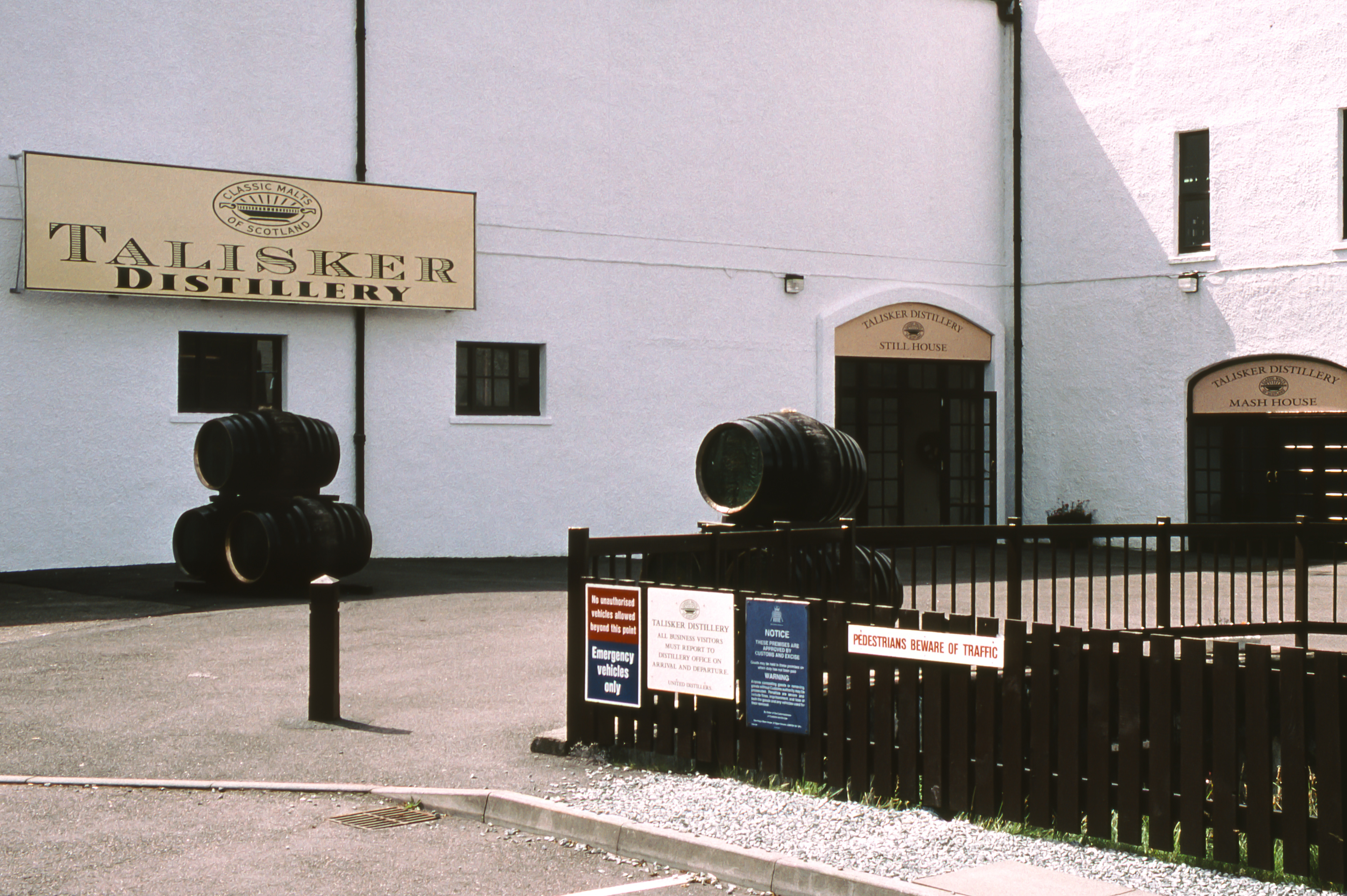 Talisker Distillery, (summer 2000)